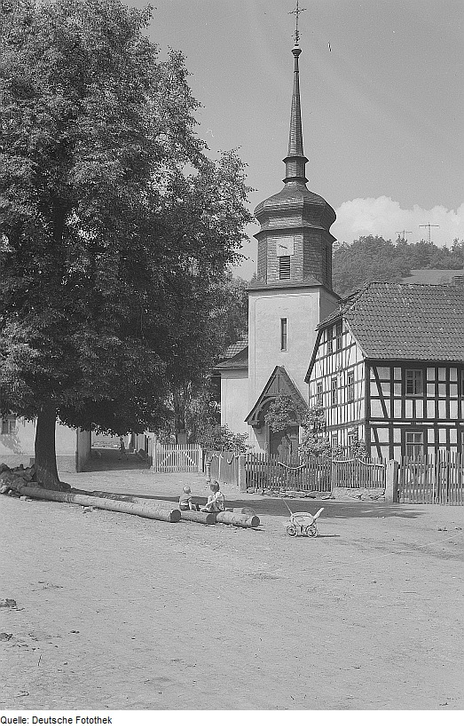 Original image description from the Deutsche FotothekReschwitz. Kirche am Dorfplatz